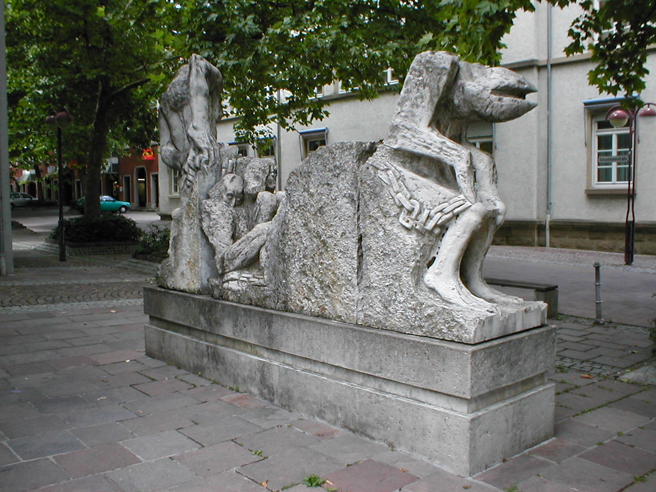 „Schwarze Hofmännin“ in Heilbronn-Böckingen, Rückansicht